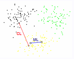 Contraintes Must-Link et Cannot-Link dans l'espace (3 groupes gaussiens)